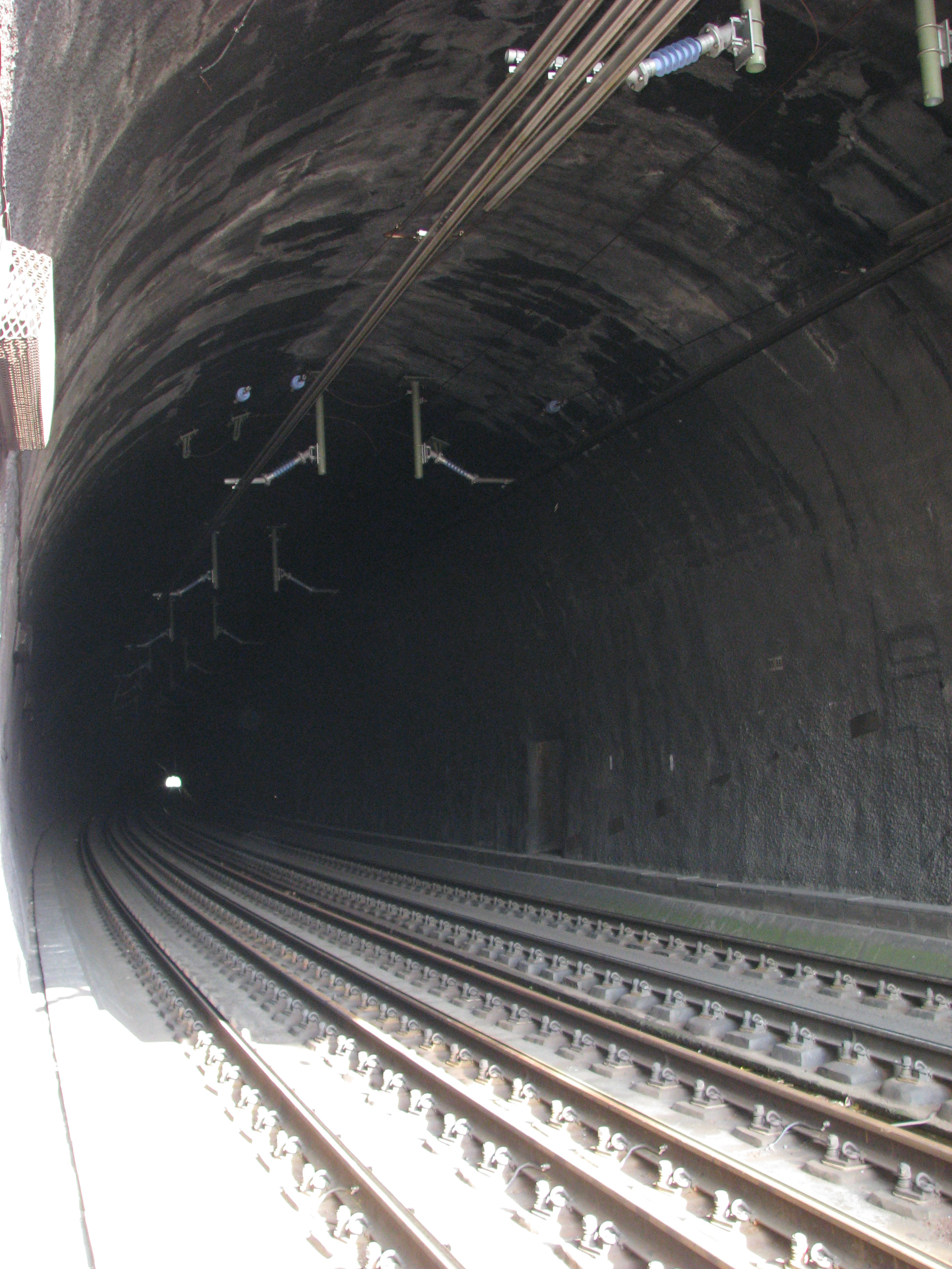 Der Gemmenicher Tunnel, Blick in den Tunnel mit speziellem Mittelgleis für überbreite Großraumtransporte und Stromschienen als Oberleitung